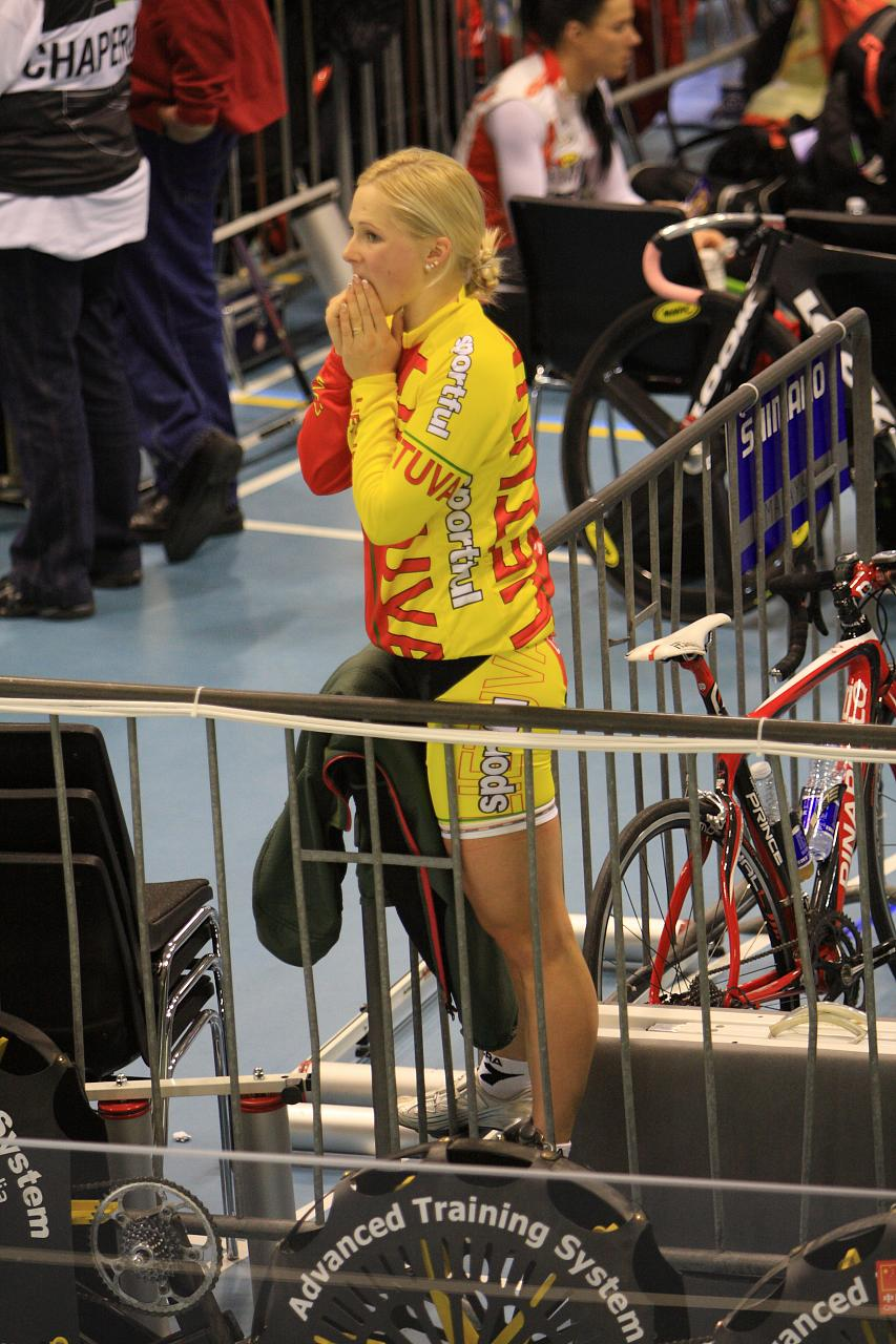 Gintarė Gaiveytė cheering for Simona Krupeckaitė